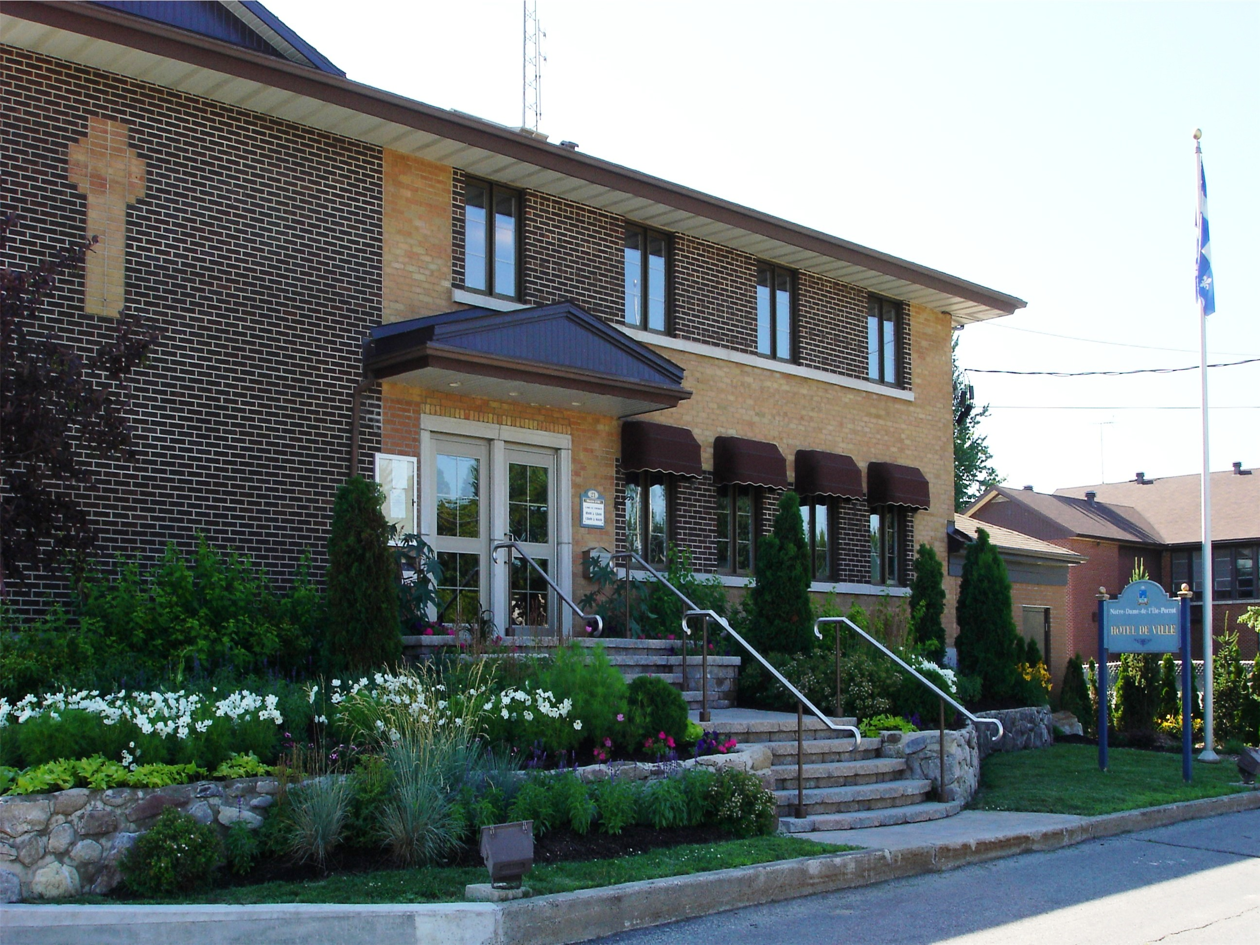 Hotel de Ville de Notre-Dame-de-l'Ile-Perrot. Notre-Dame-de-l'Île-Perrot est une des quatre ville située sur l'Île Perrot dans la municipalité régionale de comté de Vaudreuil-Soulanges au Québec (Canada), située dans la région administrative de la Montérégie. La ville a connu une augmentation démographique sans précédent durant les dernières années transformant une bonne partie de son territoire en banlieue pavillonnaire typique.